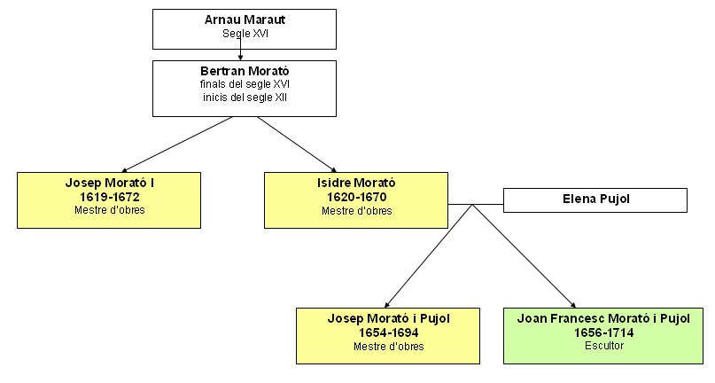 Esquema genealògic de la primera generació del Morató, artistes oriünds de Vic